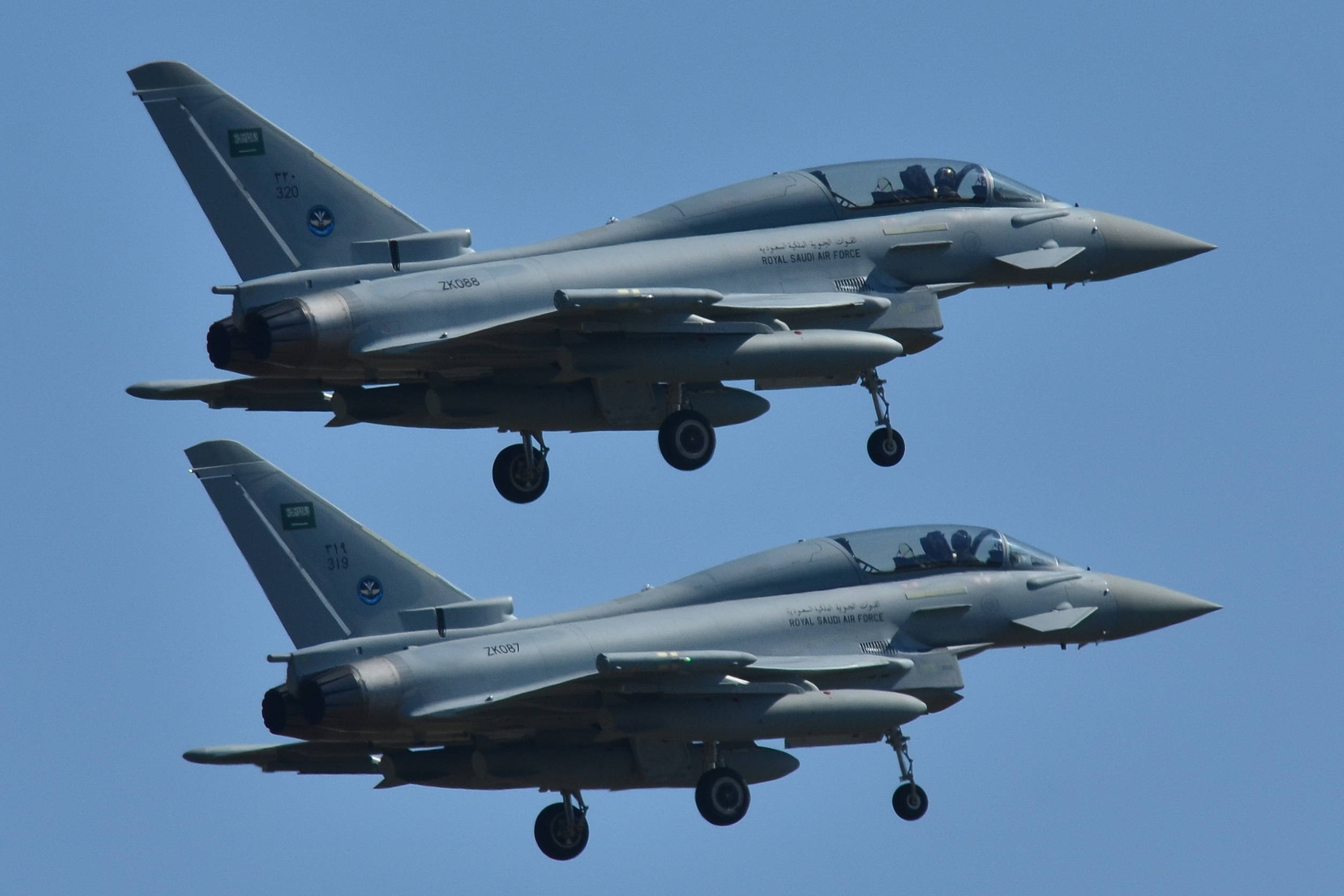 Photo prise à l'aéroport de Toulouse-Blagnac (LFBO) en France. Picture take at Toulouse-Blagnac Airport (LFBO) in France.